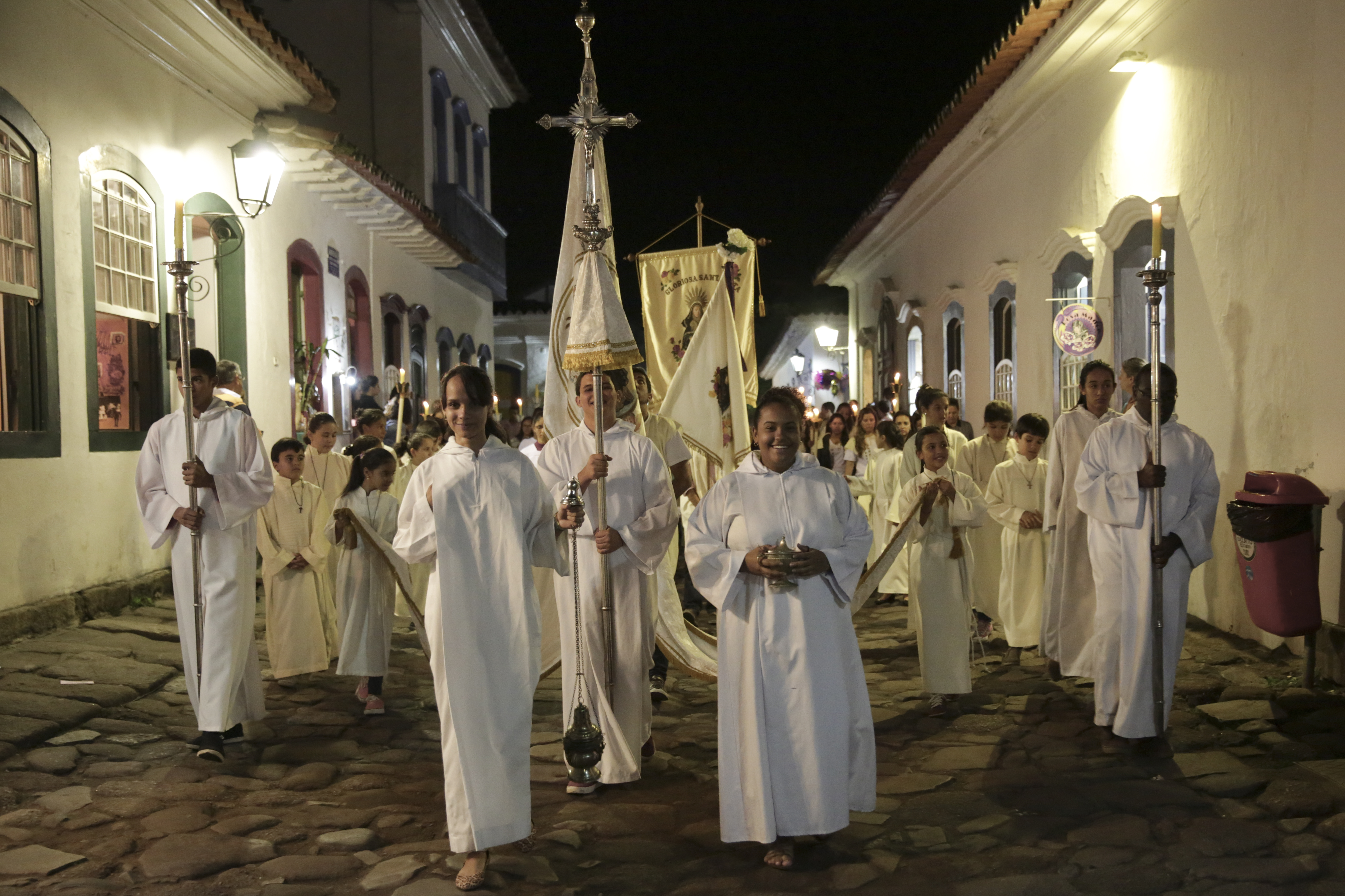 Paraty (RJ)- O Museu de Arte Sacra está novamente de portas abertas depois de quatro anos de reformas. Administrado pelo Instituto Brasileiro de Museus (Ibram), órgão vinculado ao Ministério da Cultura (MinC), o museu reúne um diversificado e precioso acervo com importantes relíquias histórico-religiosas da região. Uma procissão levou a imagem de Santa Rita e Santo Antônio da Igreja Matriz de Nossa Senhora dos Remédios (onde ficaram durante a reforma) até o MAS. Lá aconteceu a solenidade de reabertura, com a presença do ministro da Cultura, Juca Ferreira, do presidente do Instituto Brasileiro de Museus (Ibram), Carlos Roberto Brandão, do prefeito de Paraty, Carlos José Gama Miranda, e do diretor do museu, Júlio César Dantas. 13/06/2015 Foto: Janine Moraes/MinC